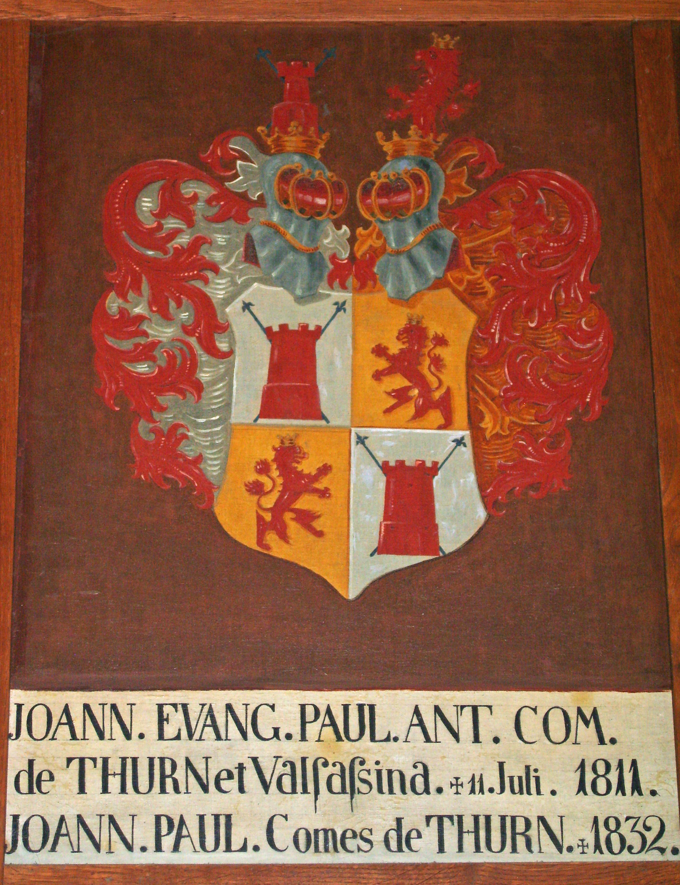 Konstanzer Münster Wappen im Kreuzgang Thurn und Valassina